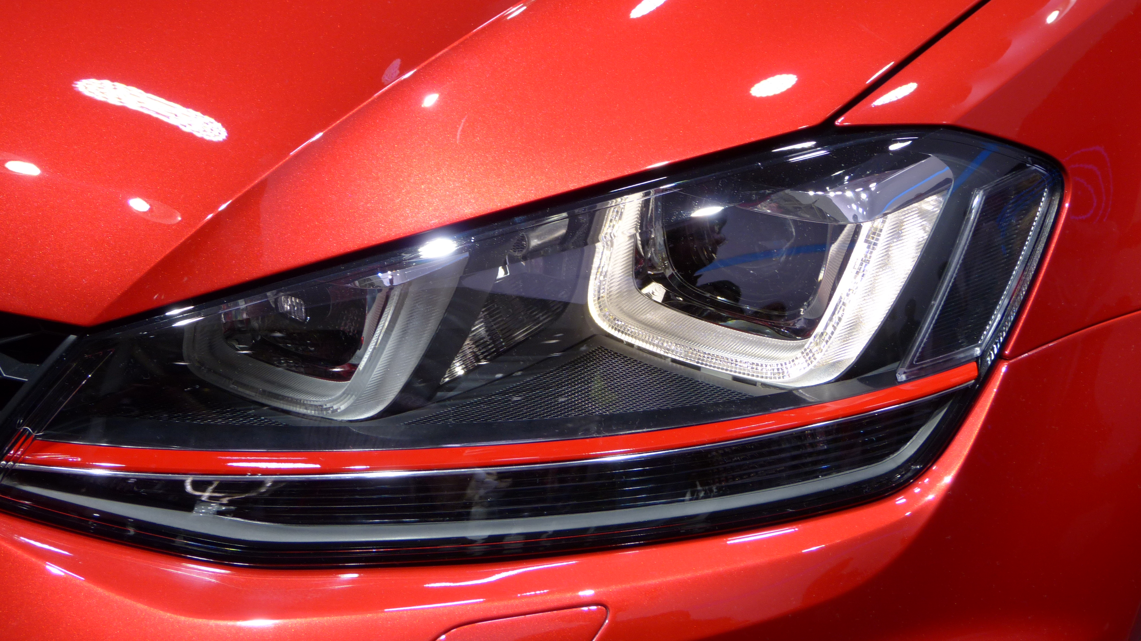 Mondial de l'automobile de Paris 2012